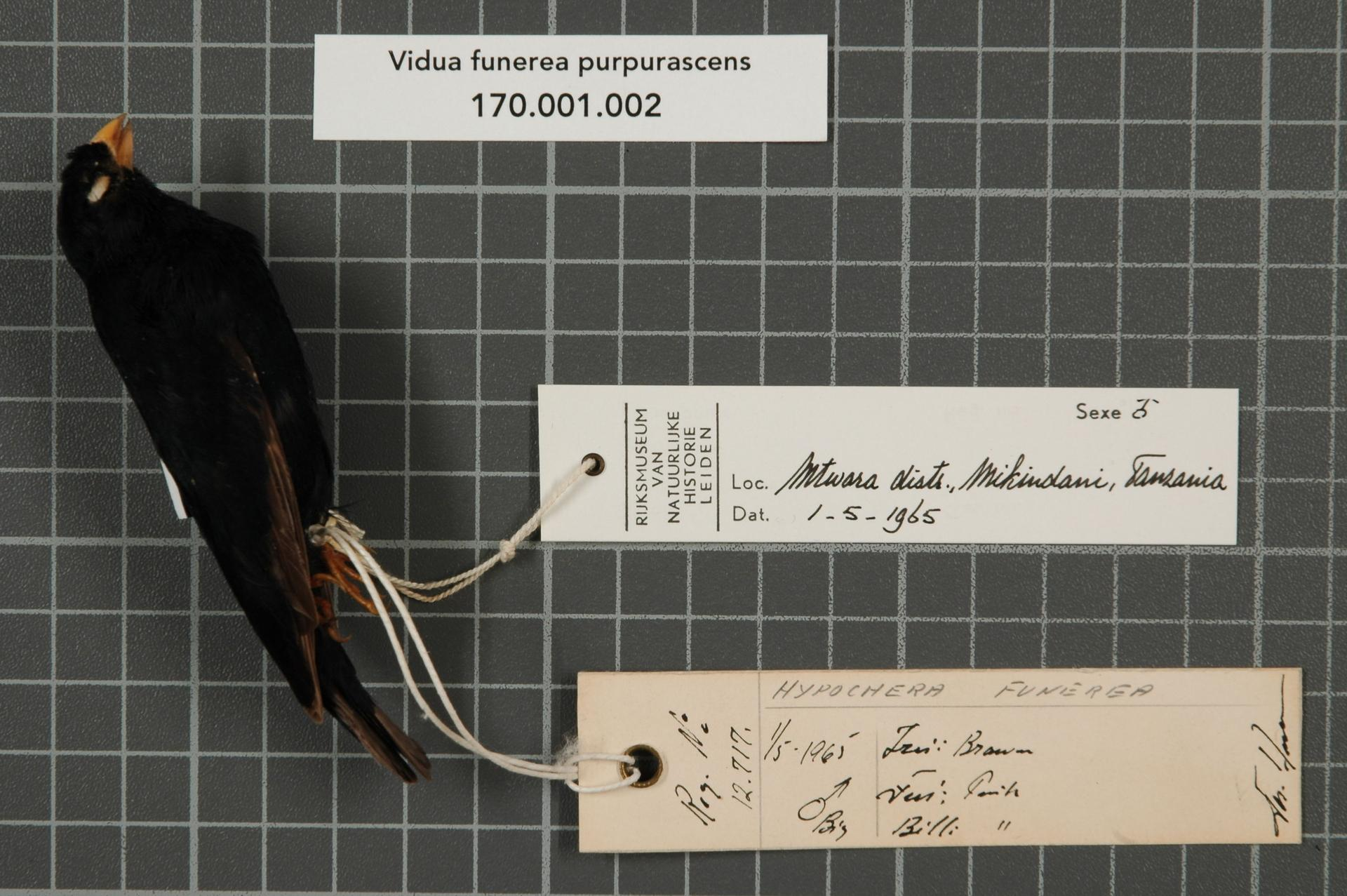 Vidua funerea purpurascens (Reichenow, 1883)